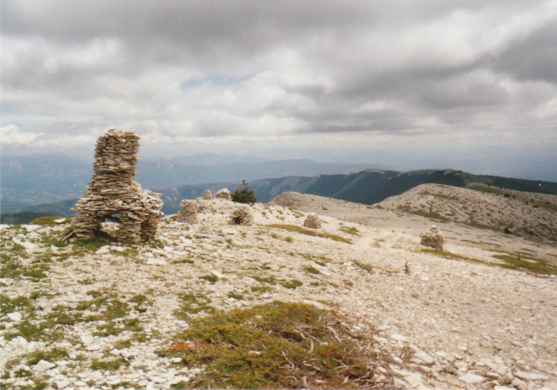 Kairns